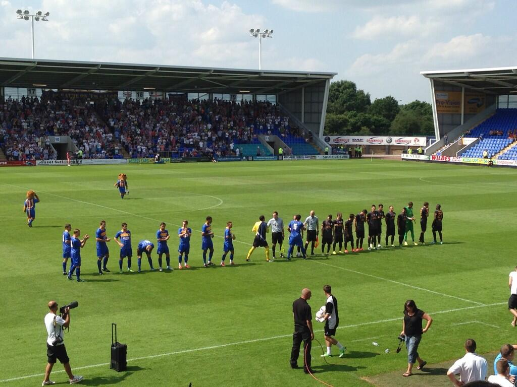 Galatasaray-Shrewsbury maçından bir kare.